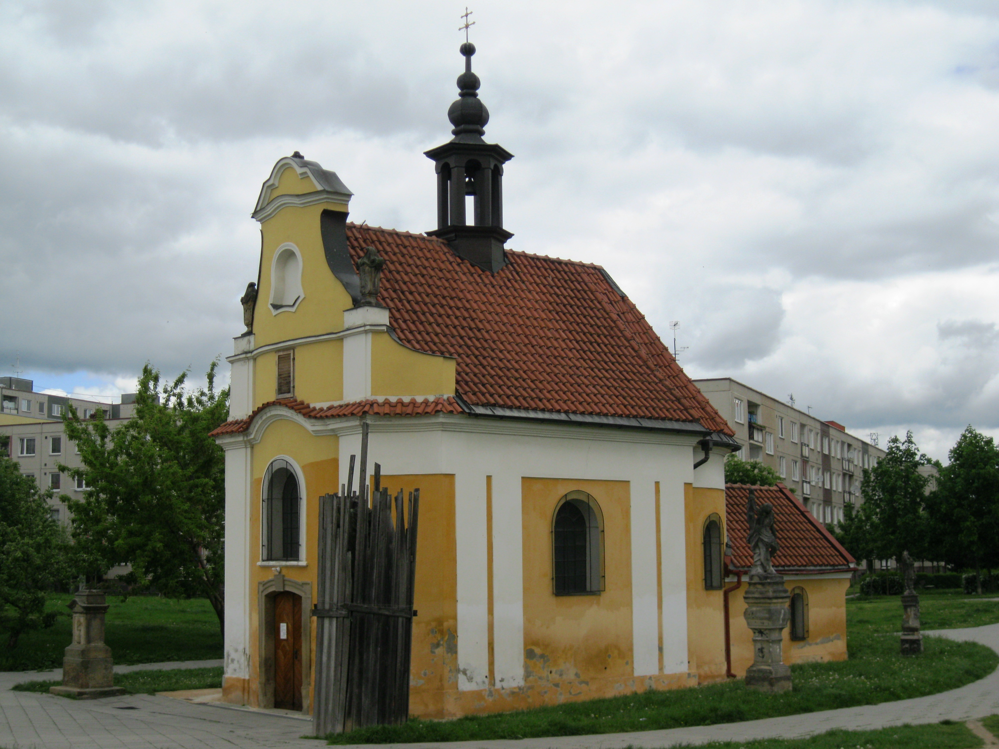 Kaple Panny Marie se sochou Boha Otce, Olomouc-Nové Sady.